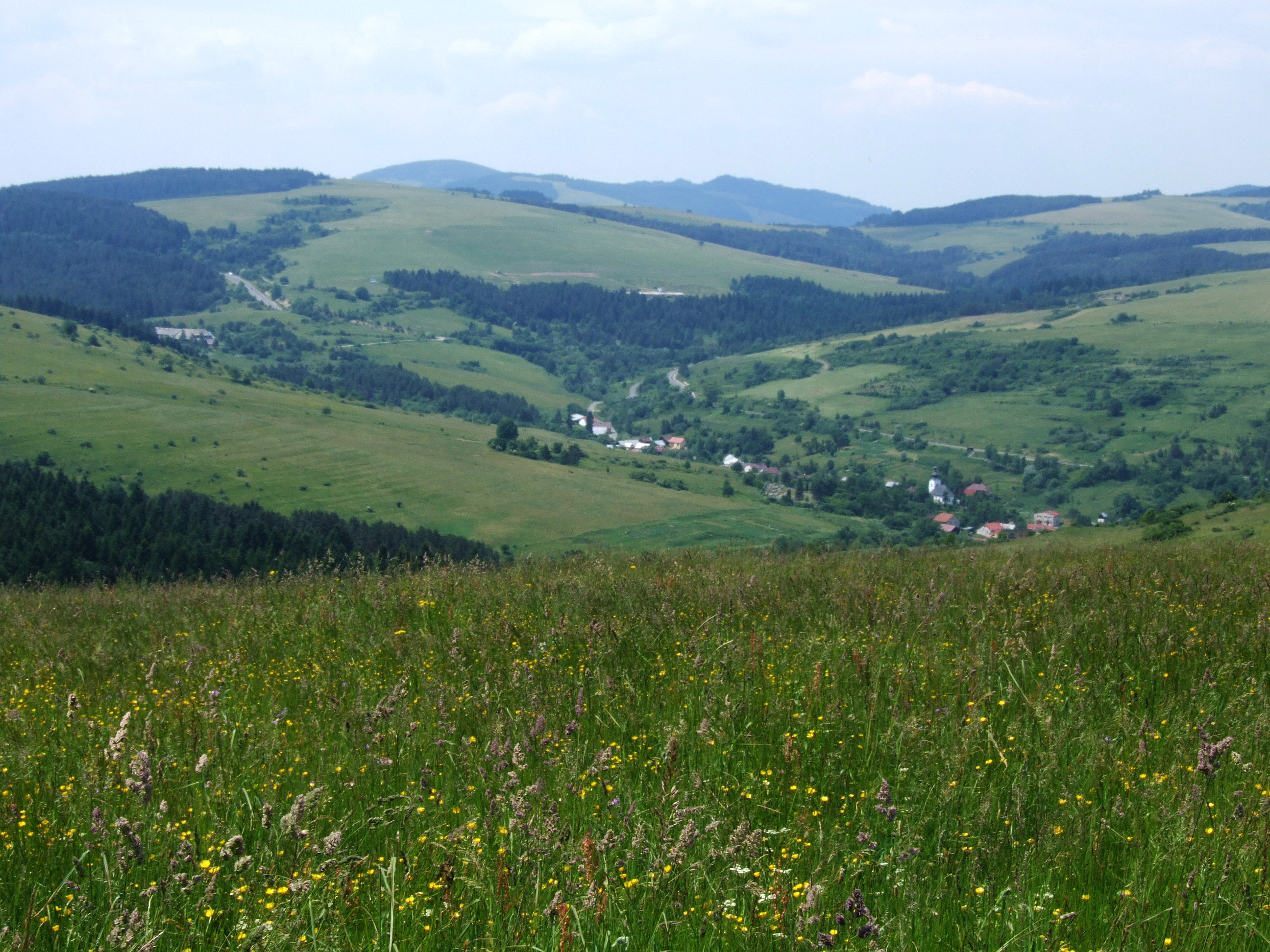 Widok z wzniesienia Kóta 772 m (ponizej Oślego Wierchu)